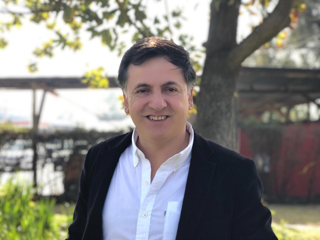 Alcalde Maximiliano Ríos Galleguillos